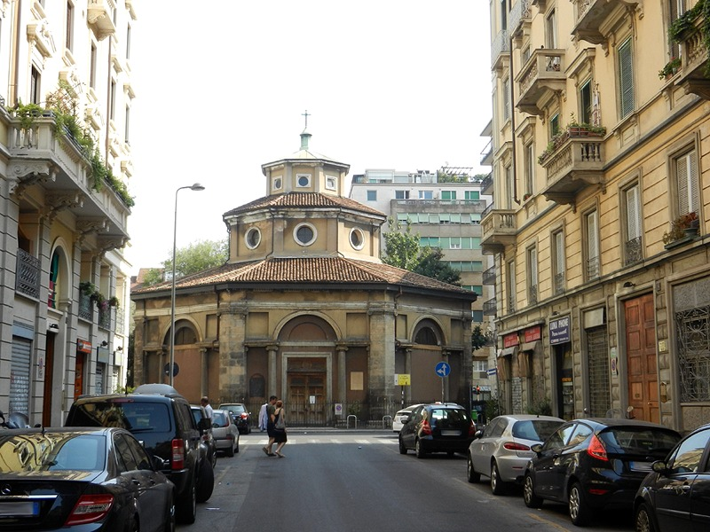 Milano - Chiesa di S. Carlo al Lazzaretto